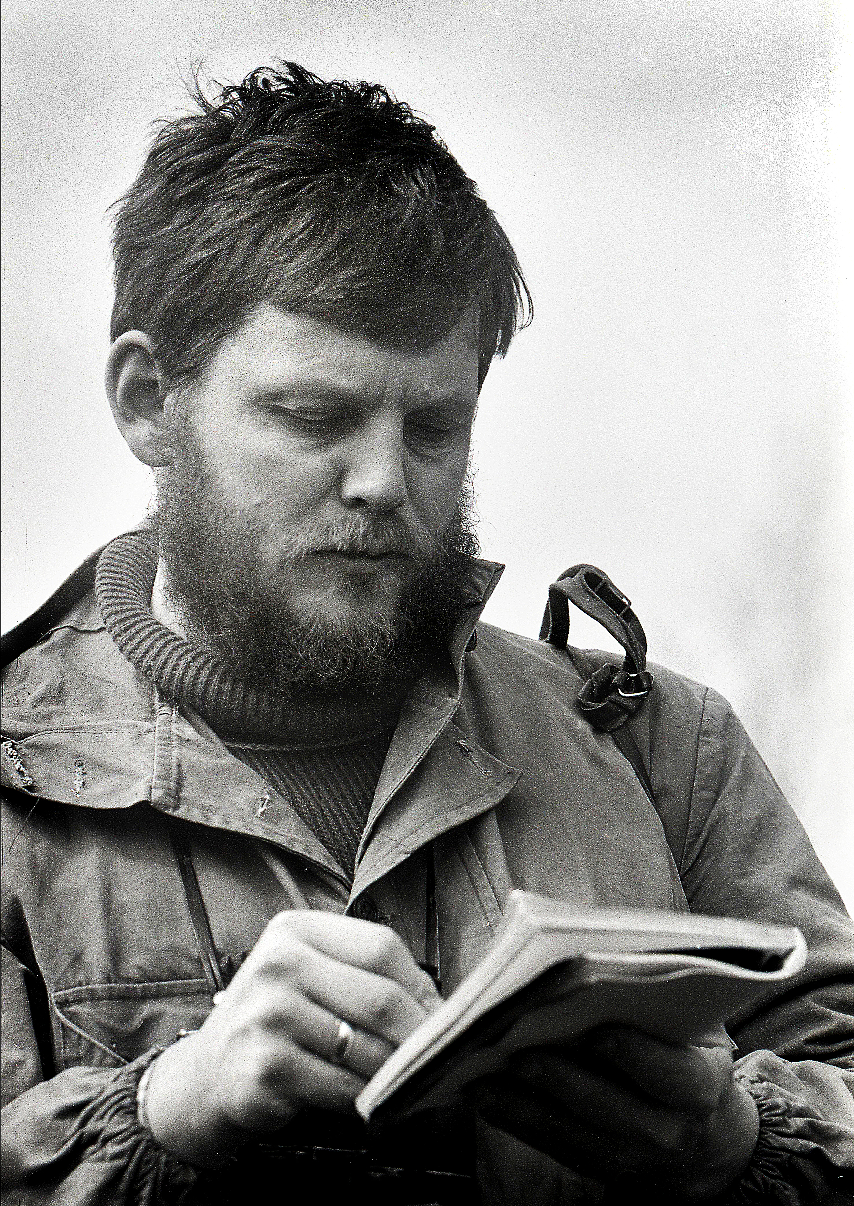 Peeter Ernits 1984. aastal